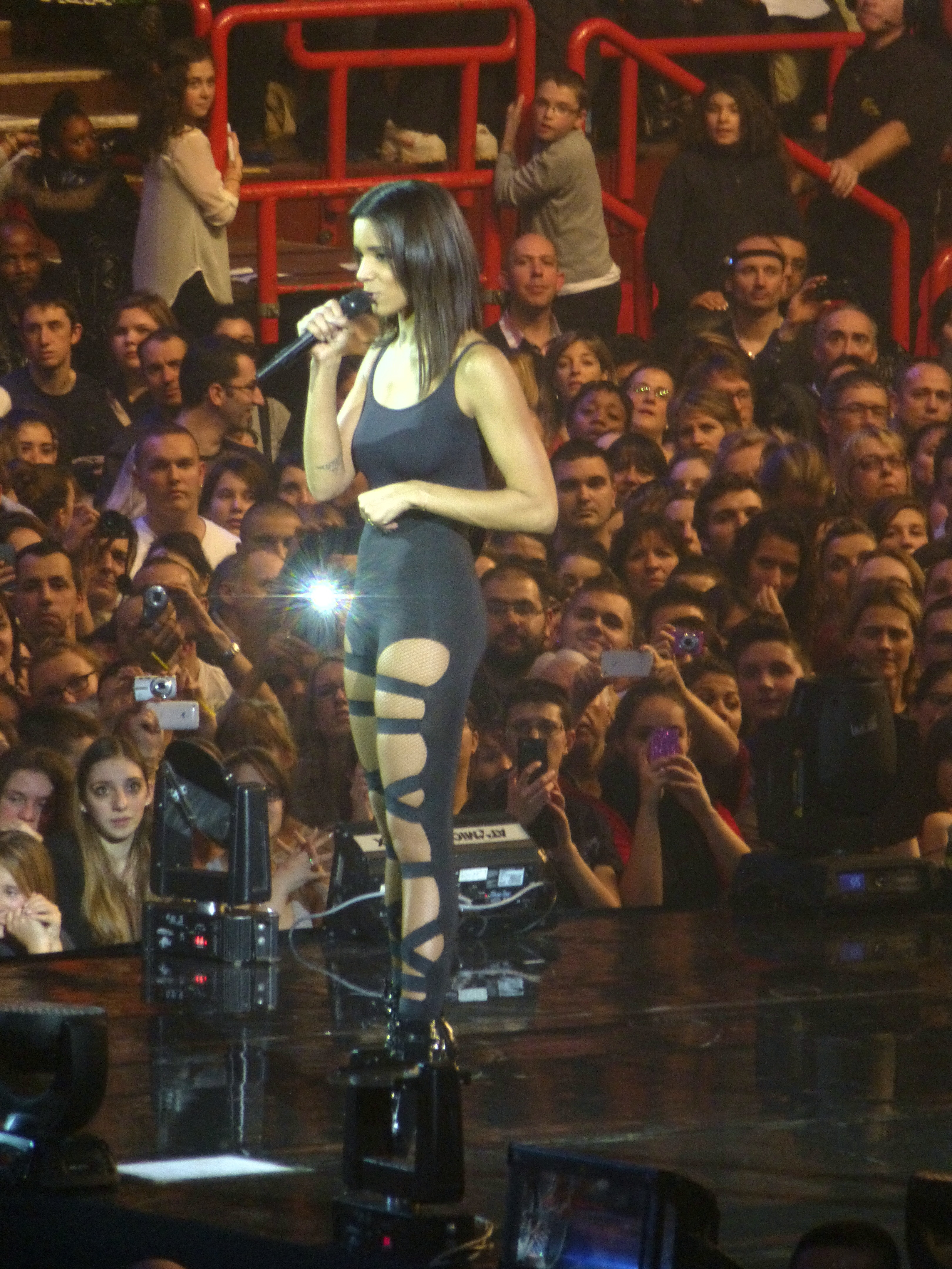 Photo prise lors du concert donné par Shy'm à Bercy.